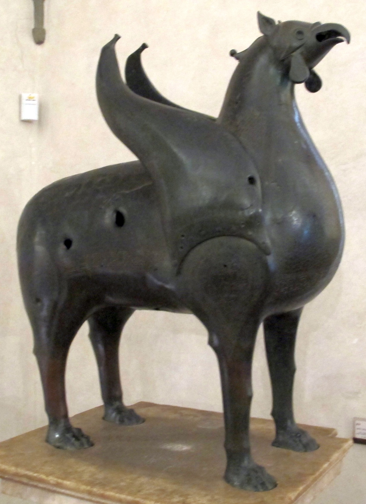 Arte islamica, ippogrifo, XI sec